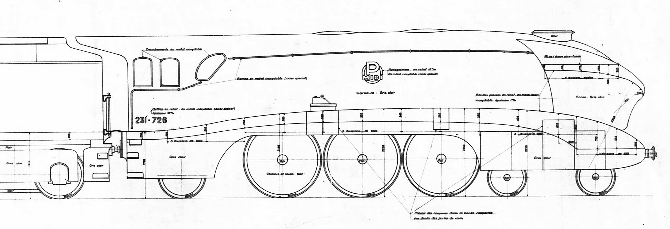 Locomotive PO 231 726 après carénage.